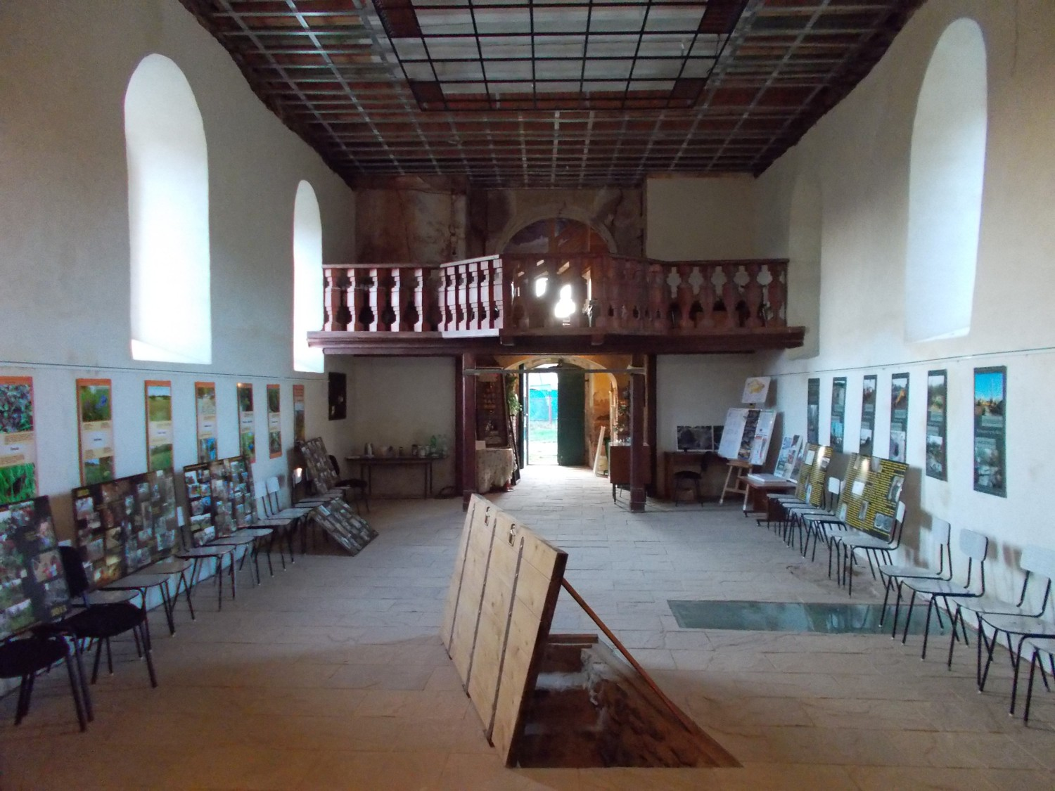 Muzeum vitráží v kostele svatého Jiljí v Libyni. Okres Louny, Česká republika.